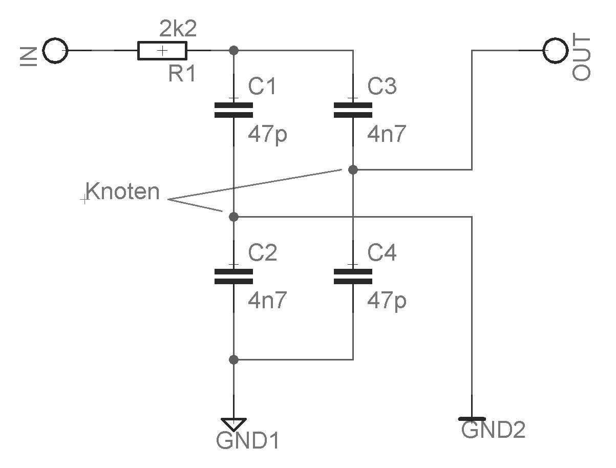 galvanische Trennung mit Kondensatorbrücke